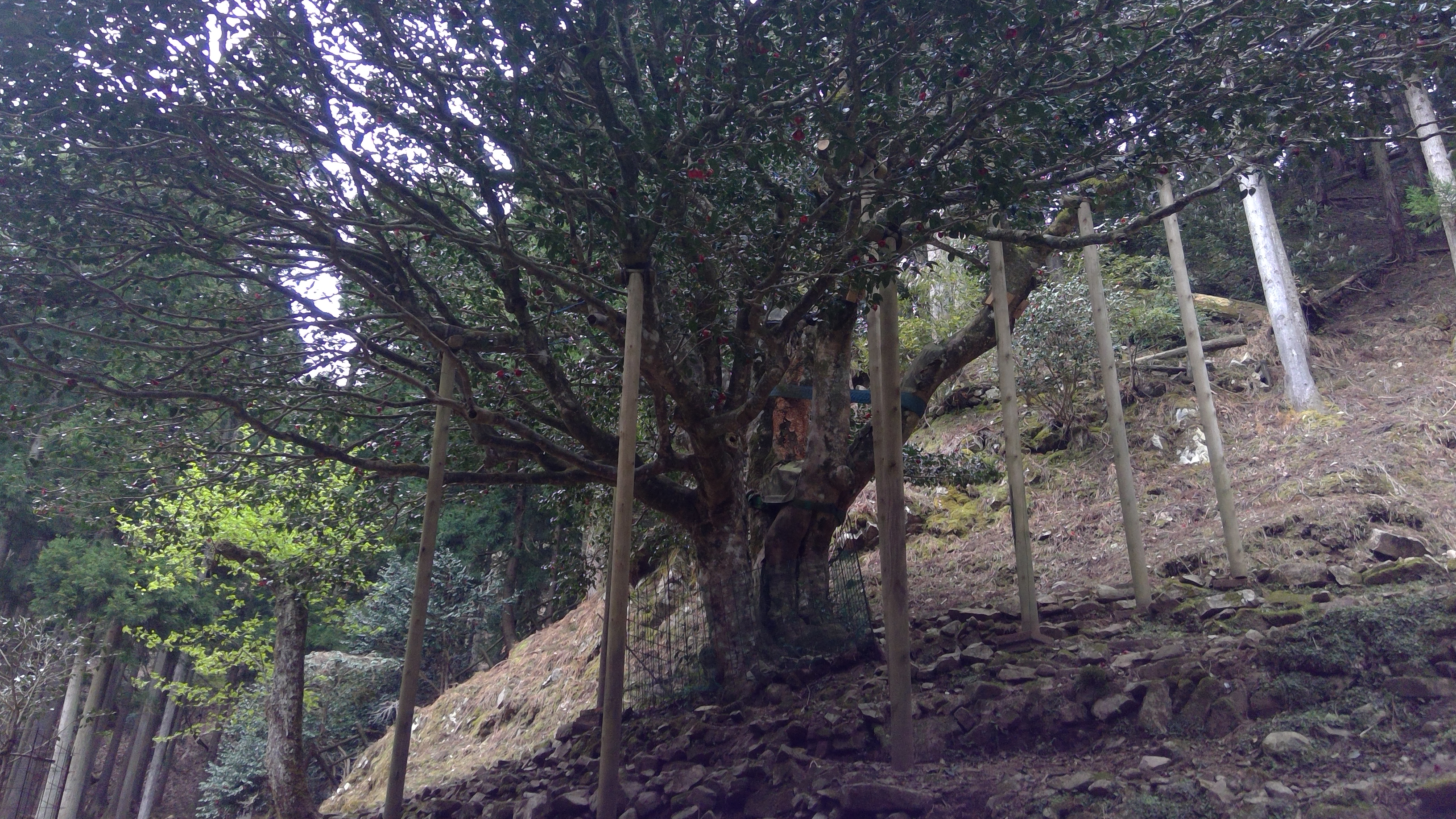 「千年椿」の愛称で親しまれる京都府与謝野町滝にあるヤブツバキの巨木